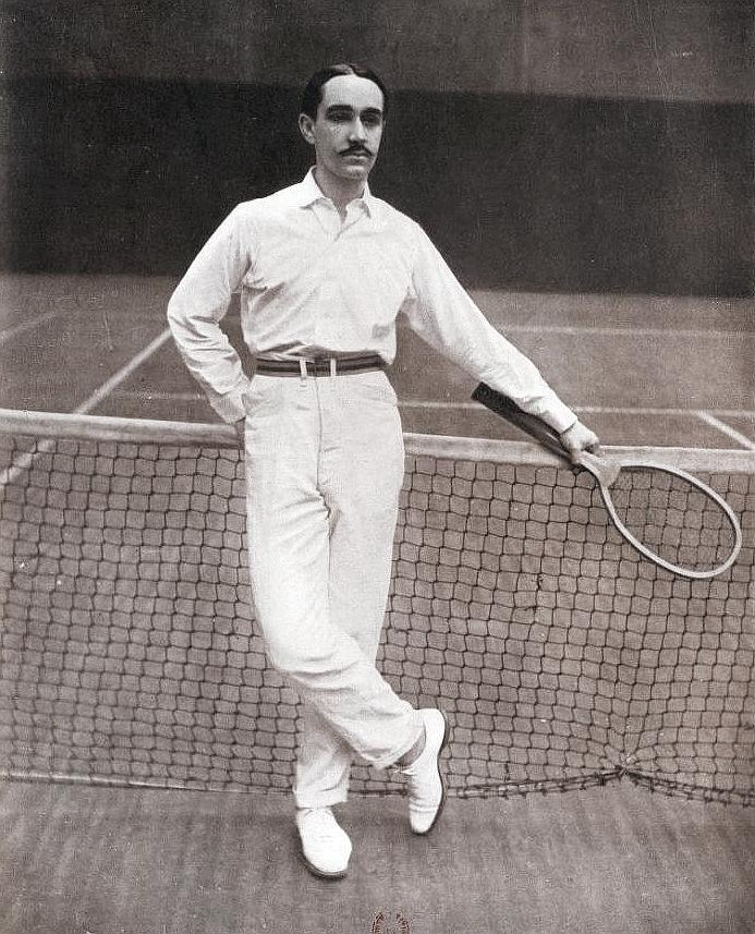 Max Decugis, en janvier 1906.